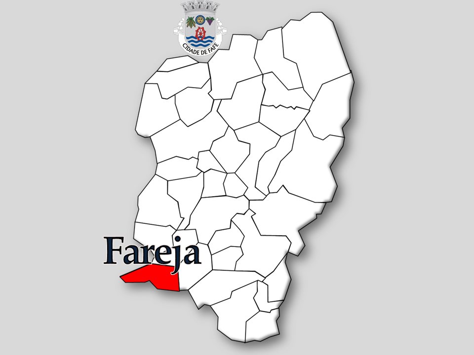 Censos 1864/2011